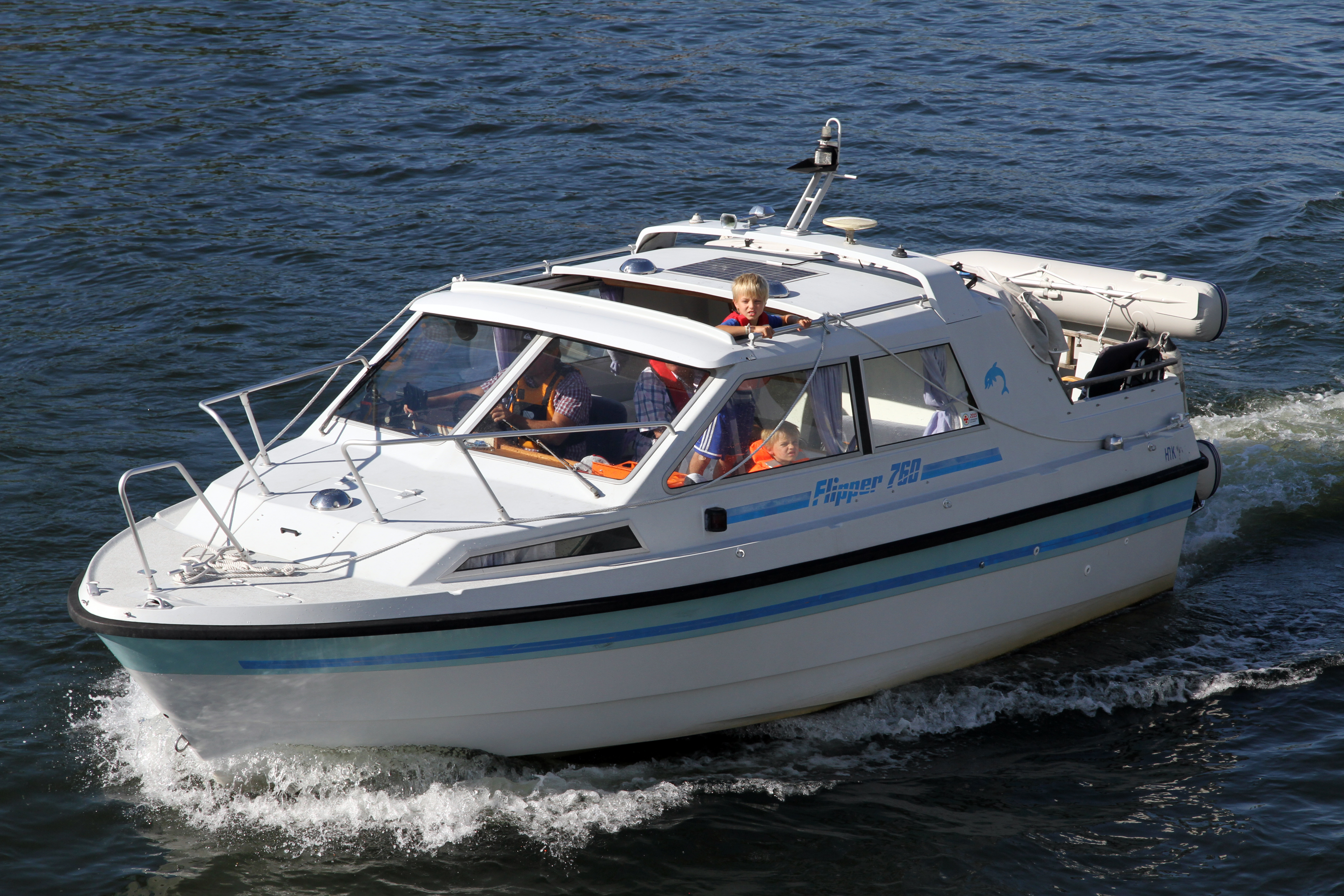 Flipper 760 i Stegesund, Vaxholm 4 augusti 2015